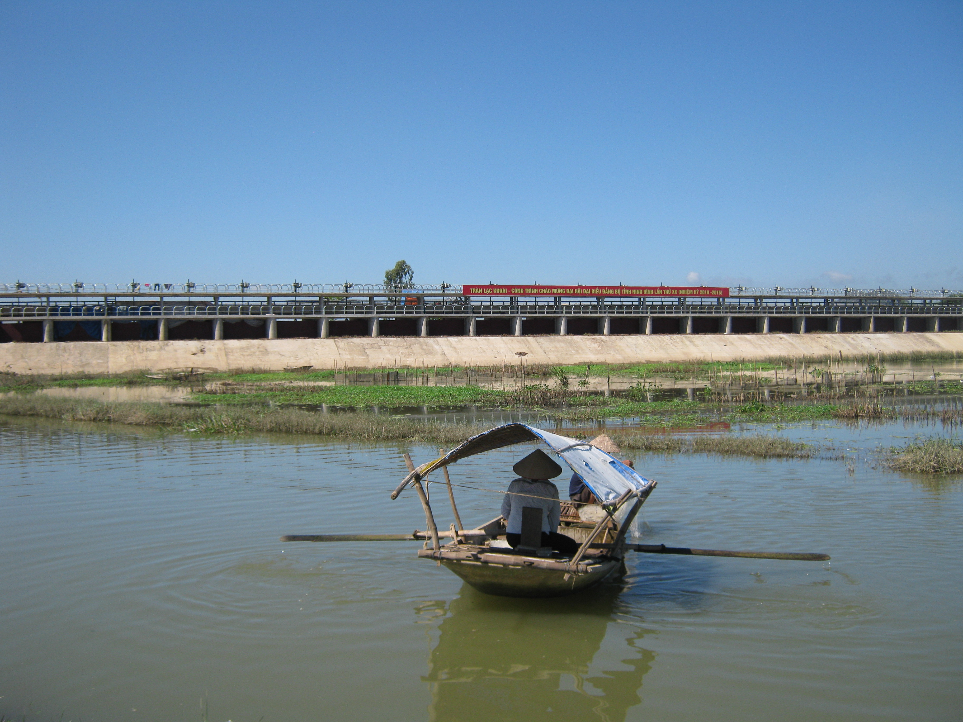 Gia Viễn